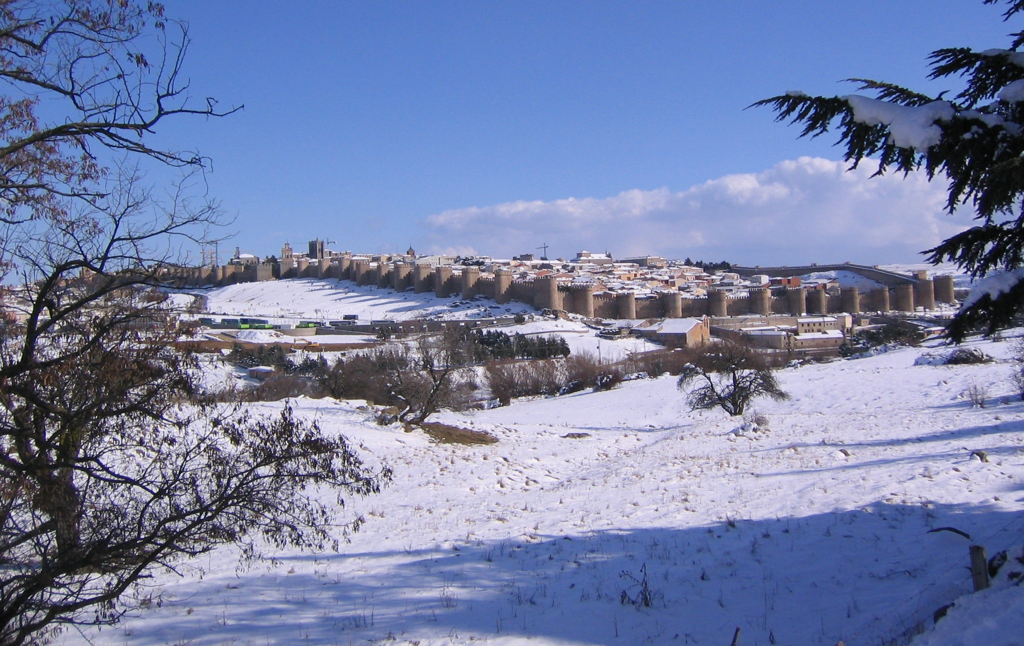 Típica postal de la muralla de Ávila monumento de la Humanidad,siempre CON O SIN NIEVE AVILA